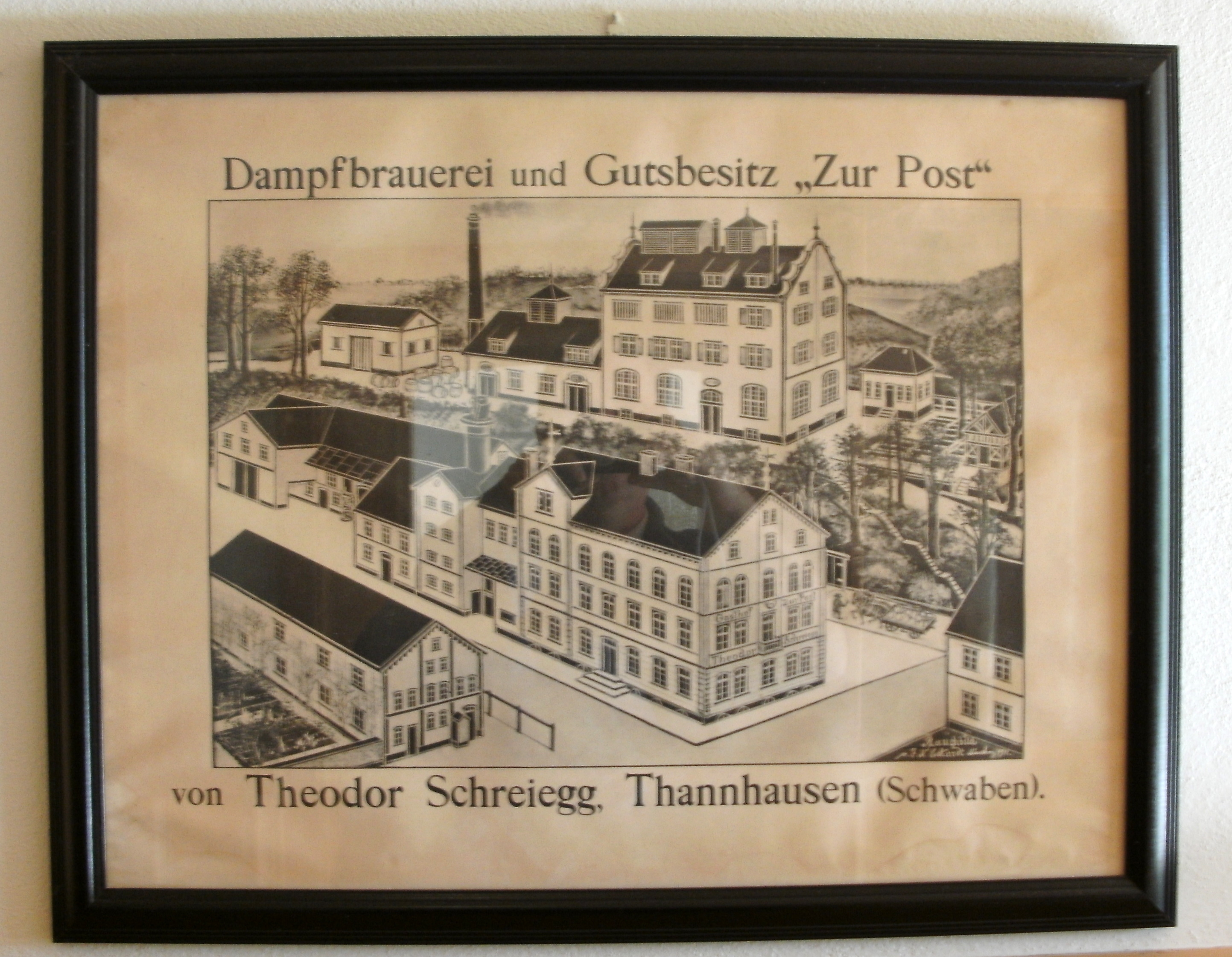 Postbräu Thannhausen (Schwaben)